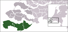 Kaart van Zeeuws-Vlaanderen, gemaakt uit sjabloon van Wikipedia-gebruiker Mtcv